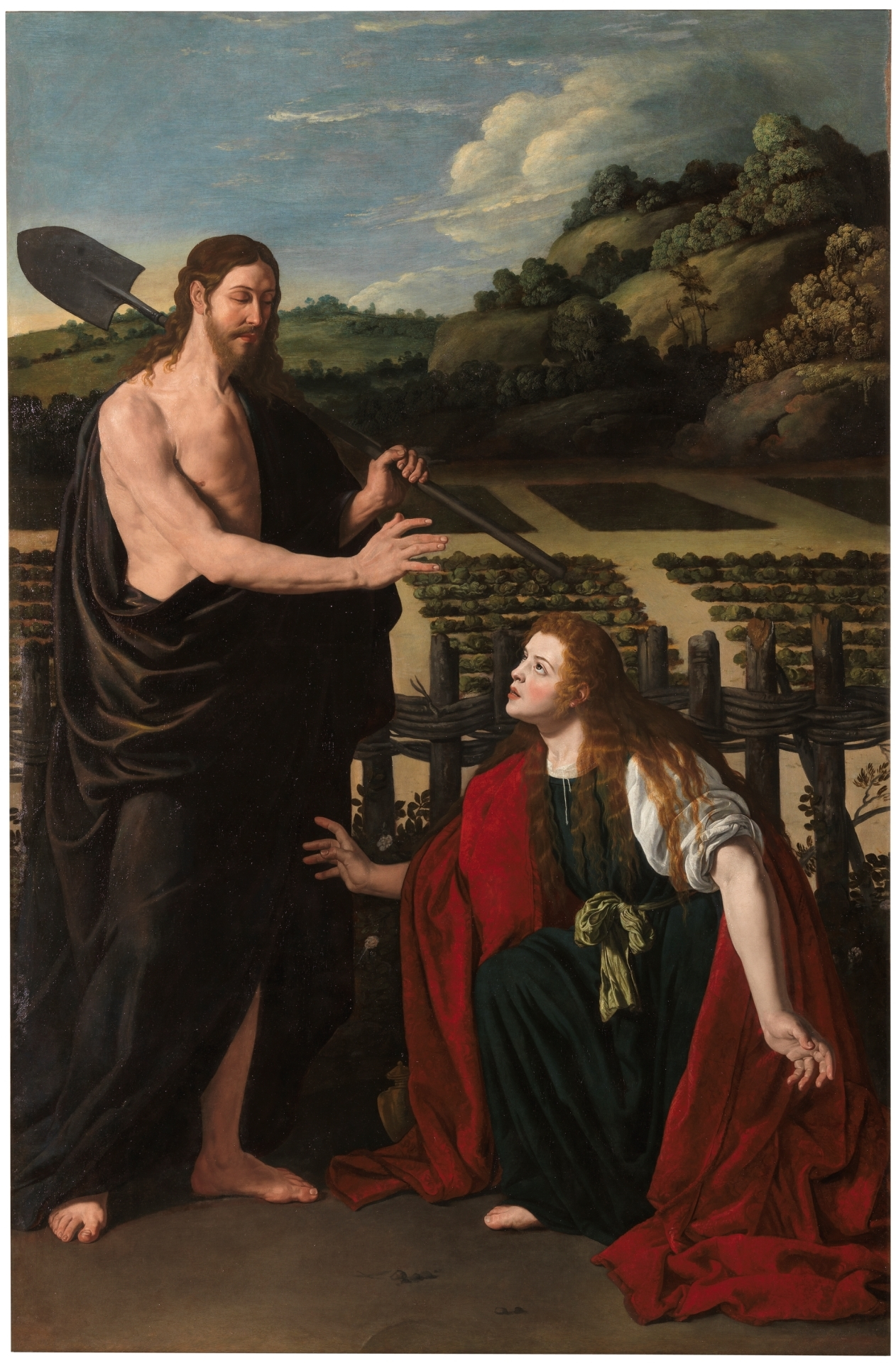 La obra representa a Jesucristo apareciéndose a Santa María Magdalena poco después de haber resucitado.